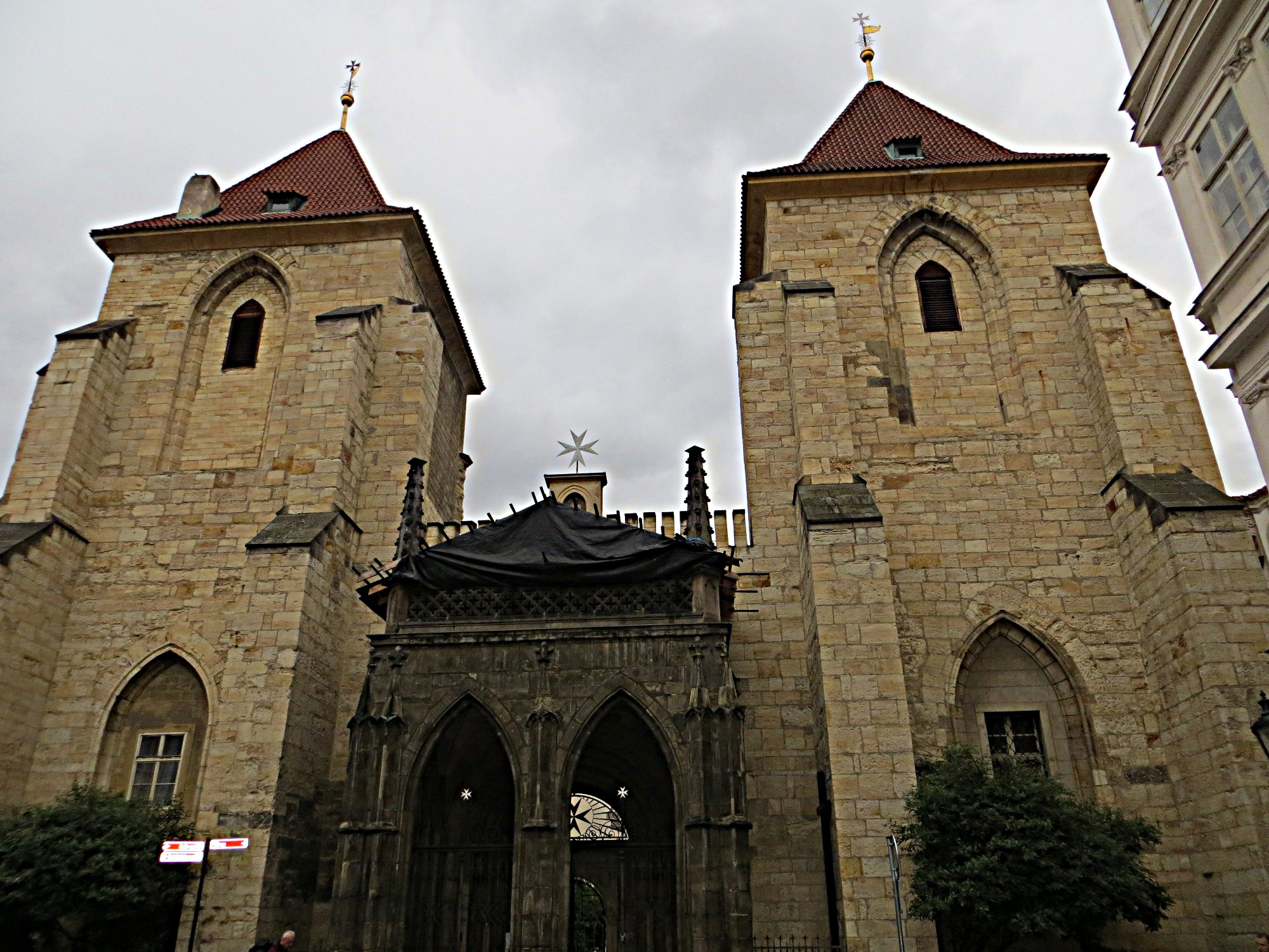 Kostel Panny Marie pod řetězem